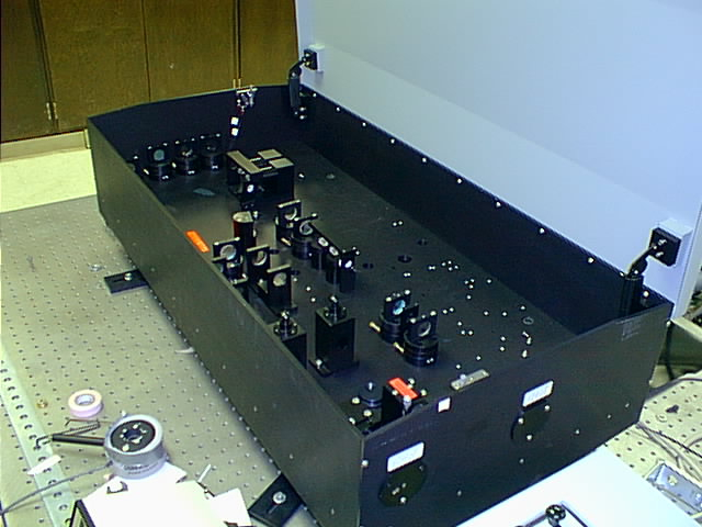 Infrared optical parametric oscillator.